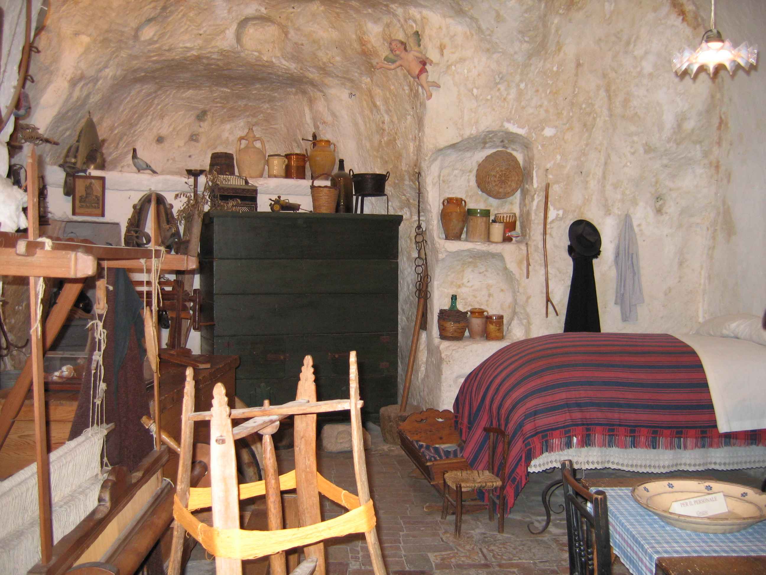 IntÃ©rieur troglodyte reconstituÃ© Tutte le foto importate su il sito di Matera sono delle foto personale fatte al' ocazione delle ferie (vacanze) nelle Puglie ; sono libere di tutti i diritti. La foto fa riferimento, in particolare, alla Casa Grotta di Vico Solitario, museo demo antropologico nel Sasso Caveoso di Matera source : photo personnelle Dominique grassigli